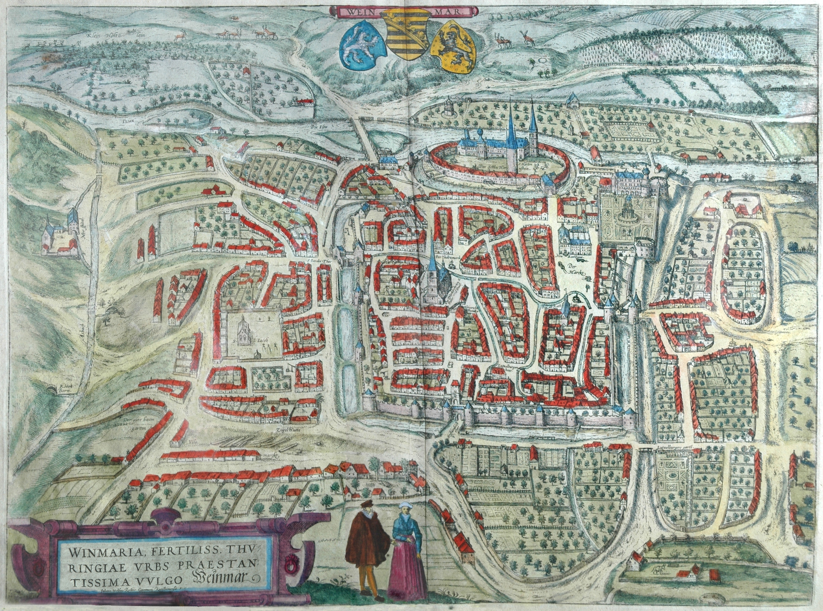 Beschreibung: Weimar, Stadtplan 1569, von Johannes Wolf. Quelle: Fotografische Kopie vom Original aus Privatbesitz. Die Kopie wurde aus vier einzelnen Fotos zusammengesetzt. Deswegen mussten die Einzelbilder angepasst und entzerrt werden. Es kann deshalb sein, dass die Kopie nicht genau Massstabgetreu und Winkelrichtig ist. Der untere Teil des Kleides der Dame wurde ergänzt. Kleinere Teile (Reflexionen) wurden vorsichtig retuschiert. Kategorie:Weimar